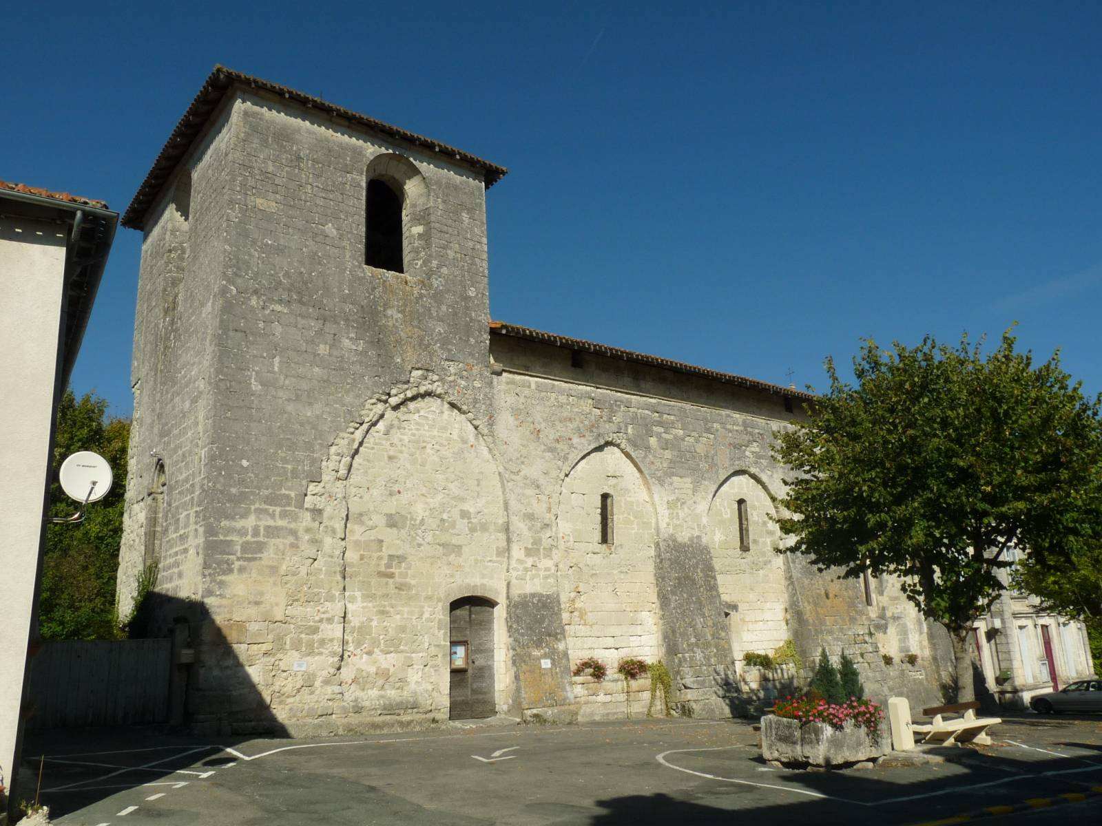 église de Cherval (24), France